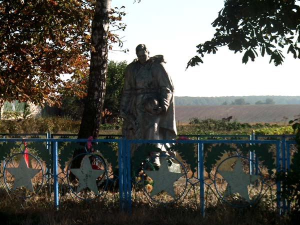 Пам'ятник Невідомому солдату с.Малий Шпаків